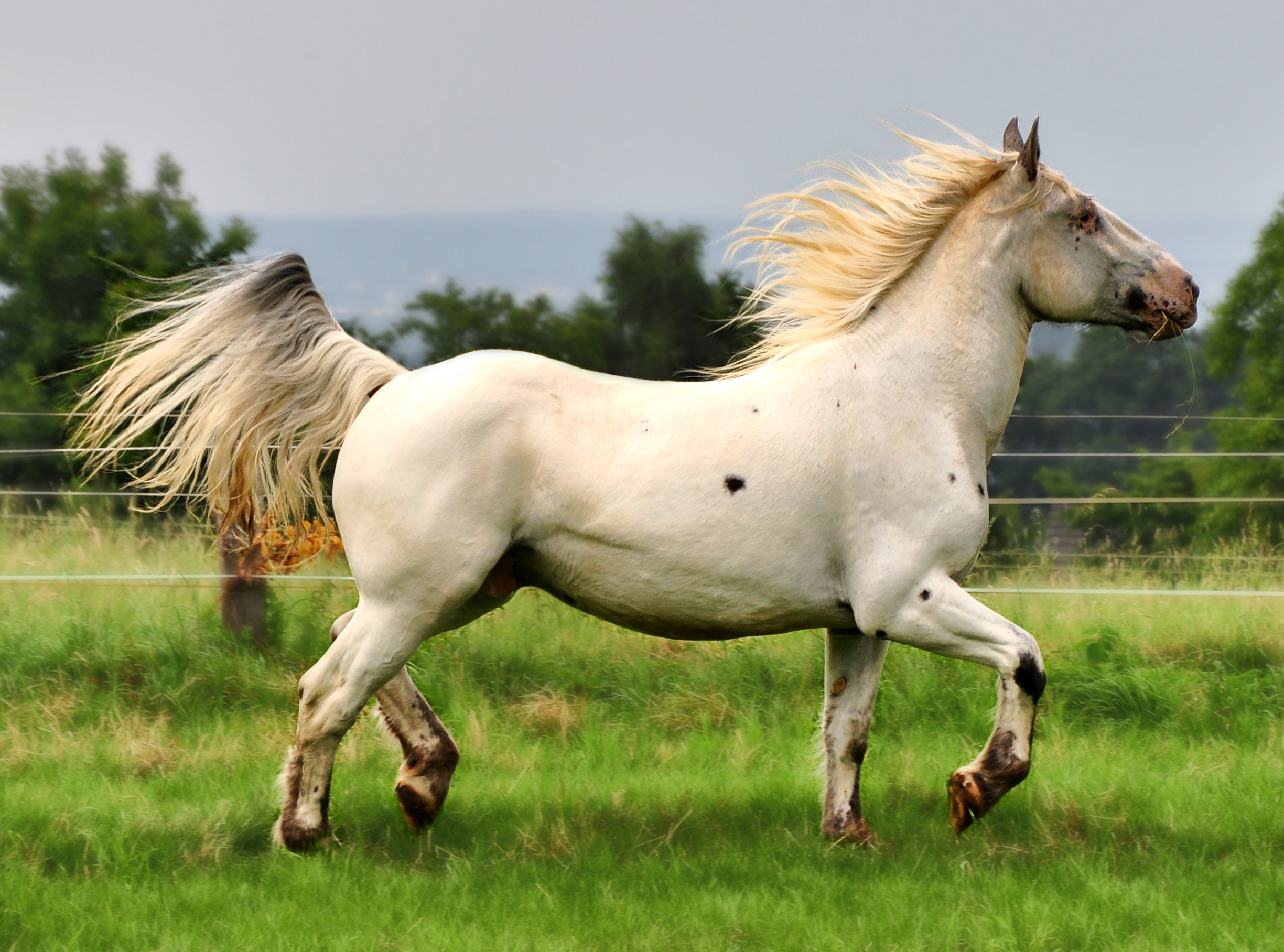 Tiger mit hohem Weiß-Anteil aus der Elmar-Linie (Noriker).